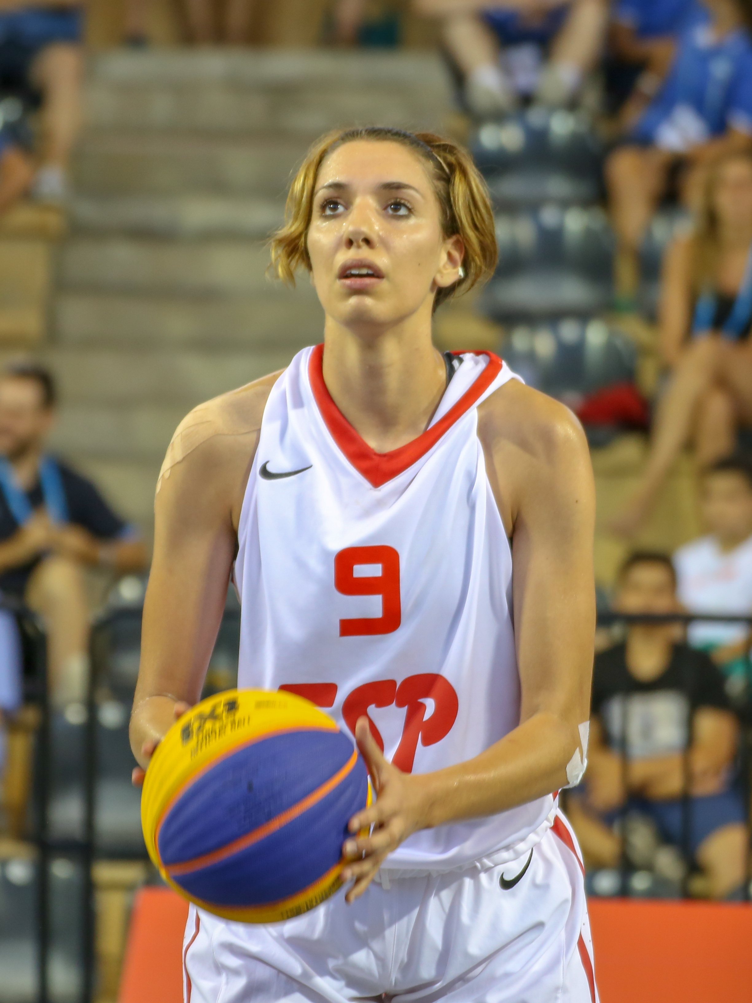 Laura Quevedo en los Juegos del Mediterráneo 2018